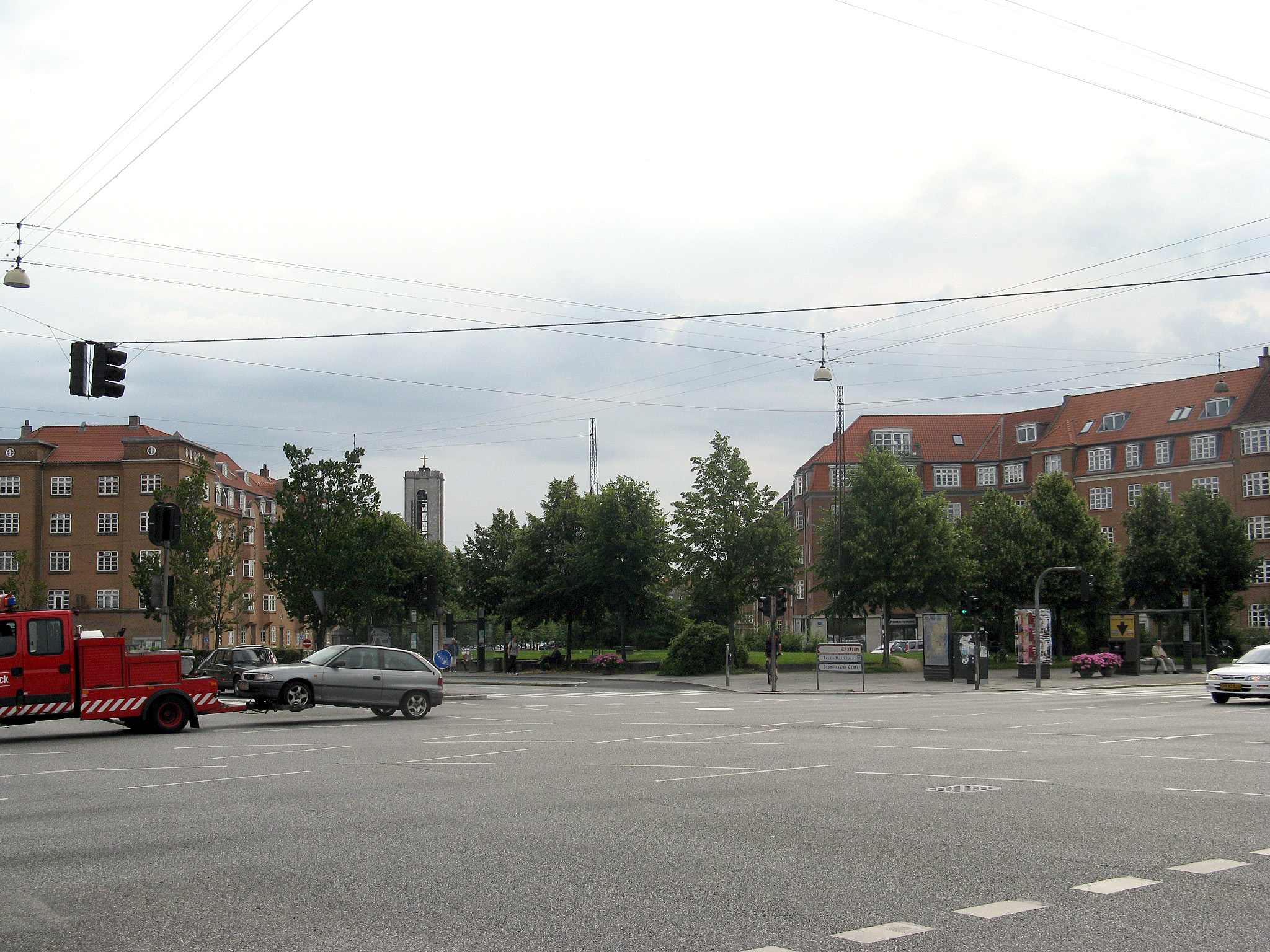 Harald Jensens Plads i Århus , Denmark